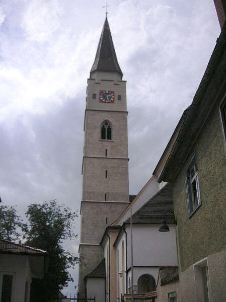 Turm der St.-Blasiuskirche in Ehingen, Deutschland.